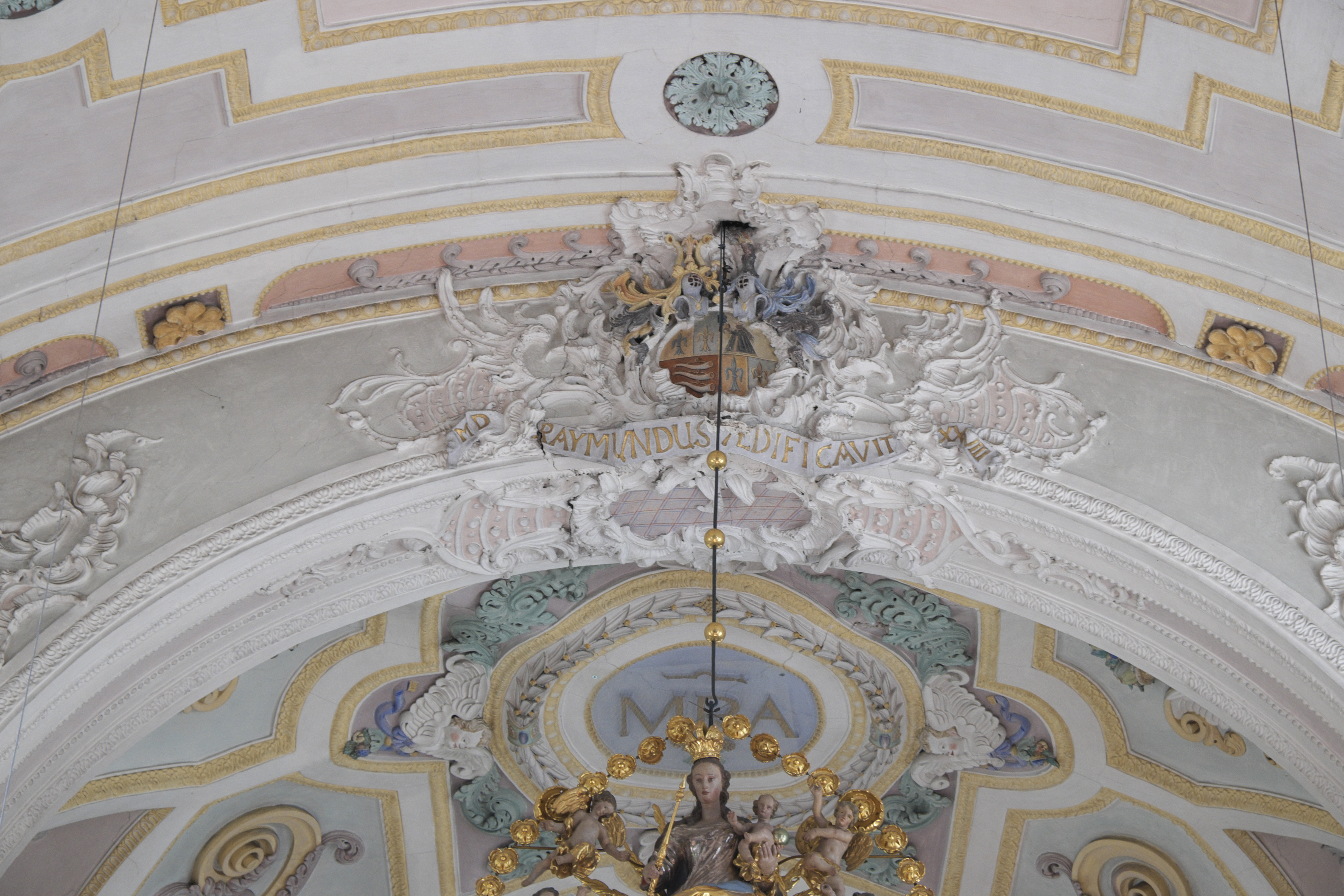 Katholische Pfarrkirche St. Wolfgang in Mickhausen im schwäbischen Landkreis Augsburg (Bayern/Deutschland), Rocaillekartusche von Jakob Jehle am Chorbogen, von 1755; Wappen von Raimund Fugger